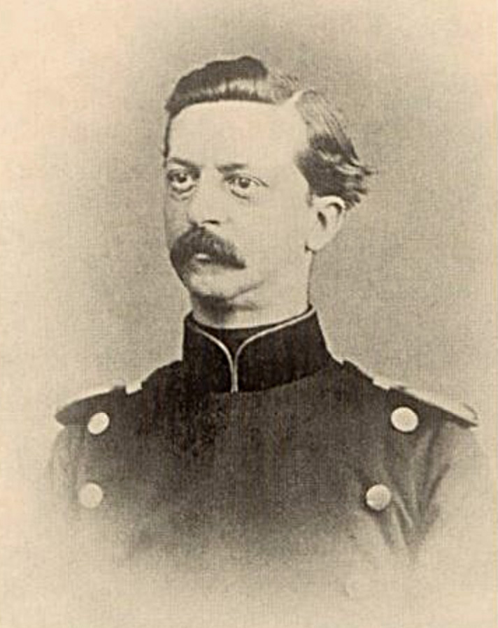 Ludwig Hölzermann (1830-1870), Foto um 1865